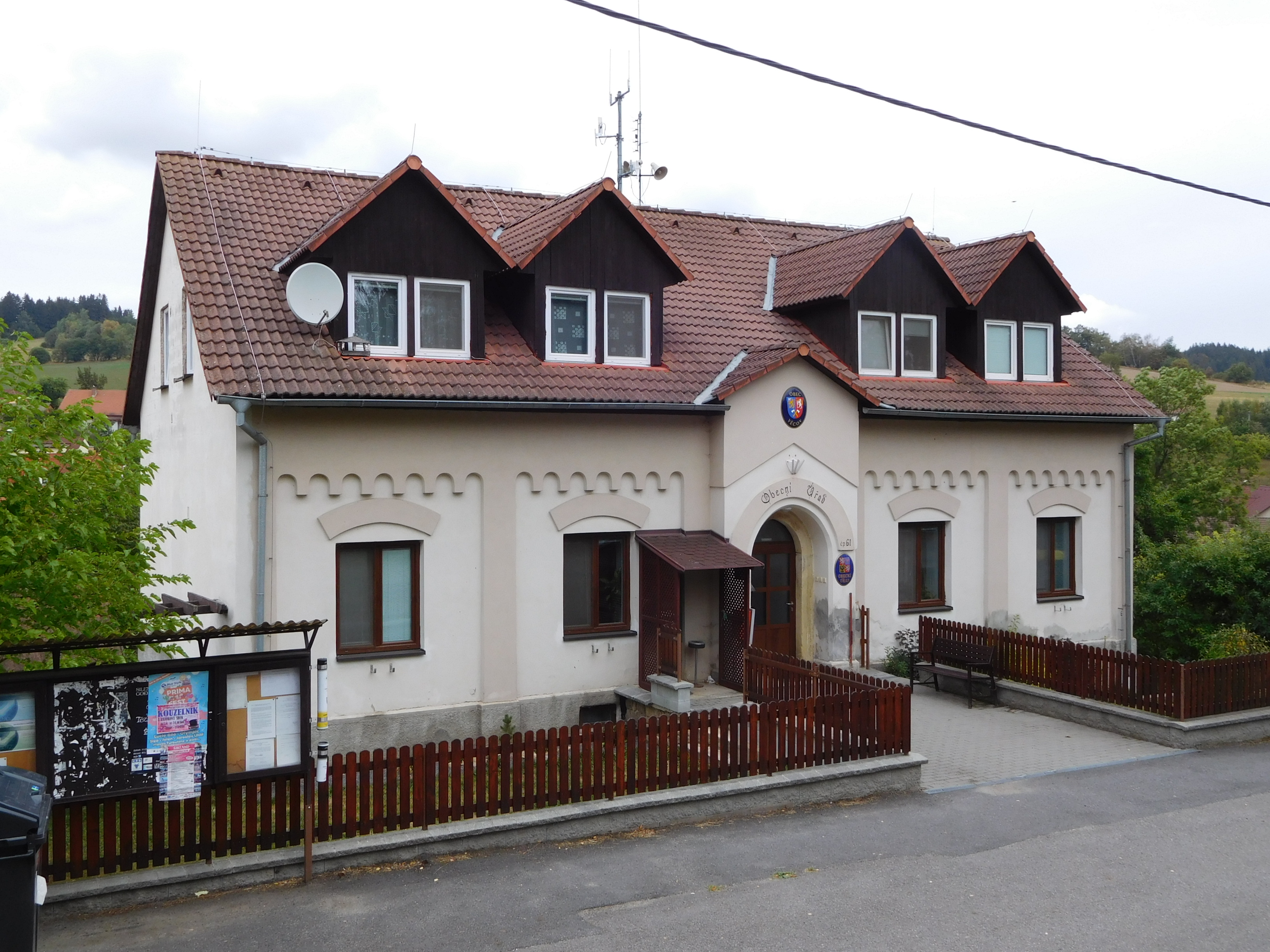 Věcov - č.p. 61, obecní úřad a knihovna